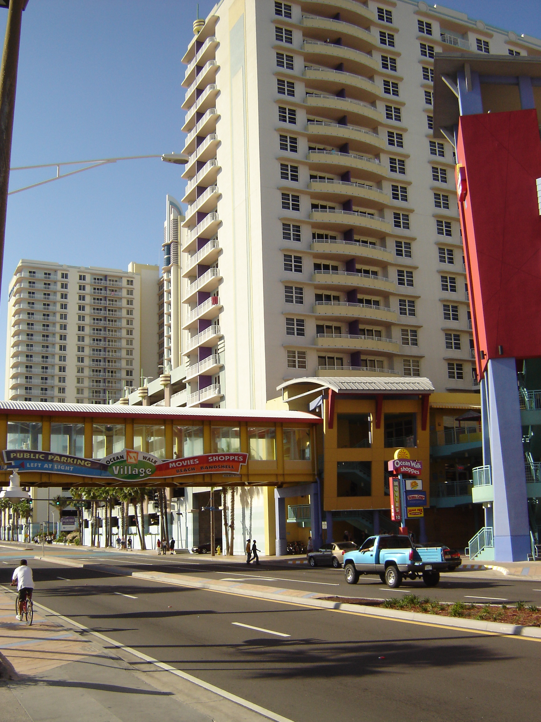 Ocean Walk Walkway